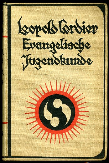 Leopold Cordier, Evangelische Jugendkunde, Schwerin : Verlag Friedrich Bahn, 1925. (1. Aufl.) S. 496. 8° (22,5 x 15 cm) , Leinen